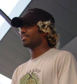 Sri Lankan cricketer Lasith Malinga